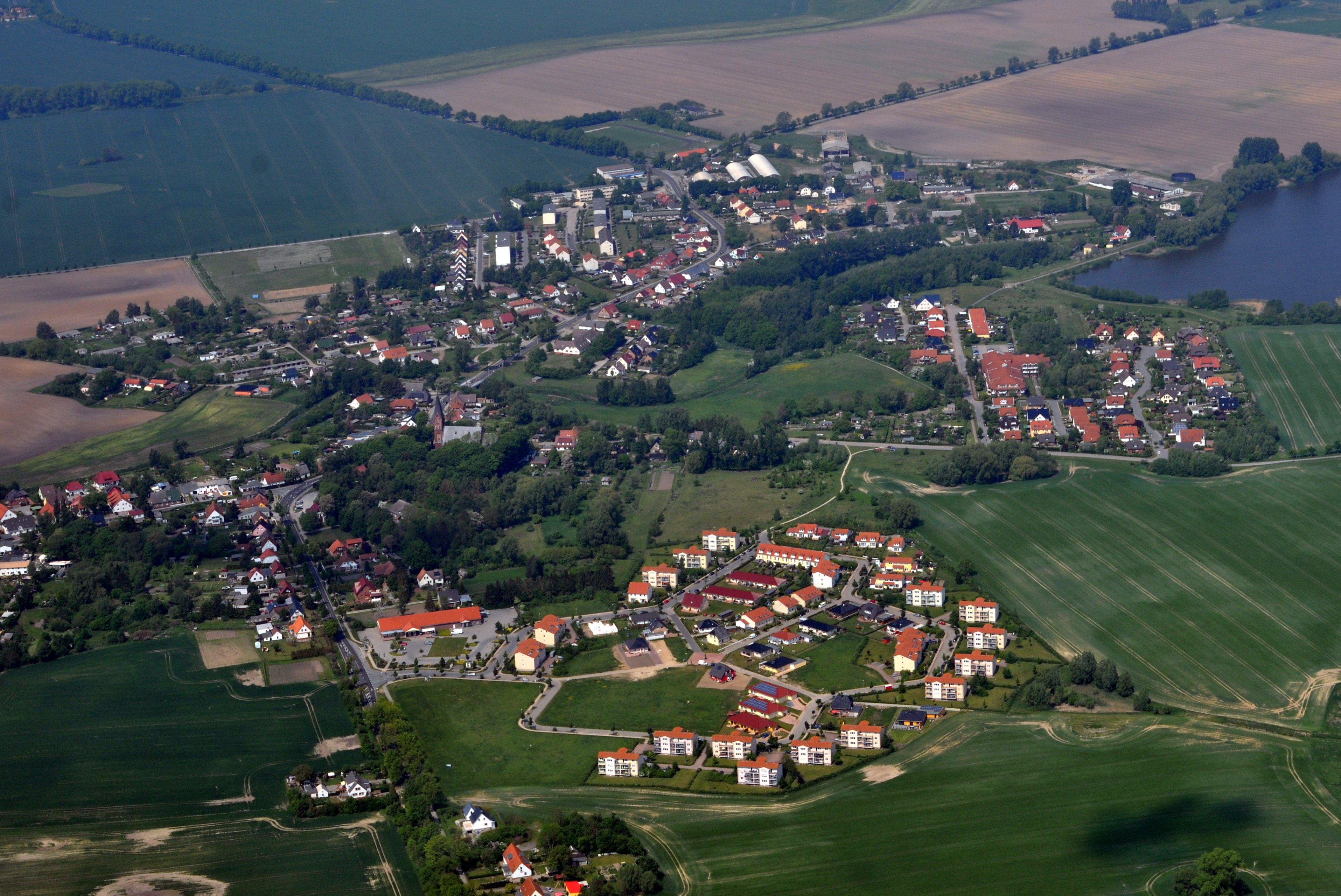 Die Bilder wurden von mir während eines einstündigen Rundflugs ab Flugplatz Güttin am 21. Mai 2011 aufgenommen. Die Bildbeschreibung steht im Dateinamen. Aufgenommen mit einer Nikon D5000 durch das Seitenfenster des Flugzeugs.